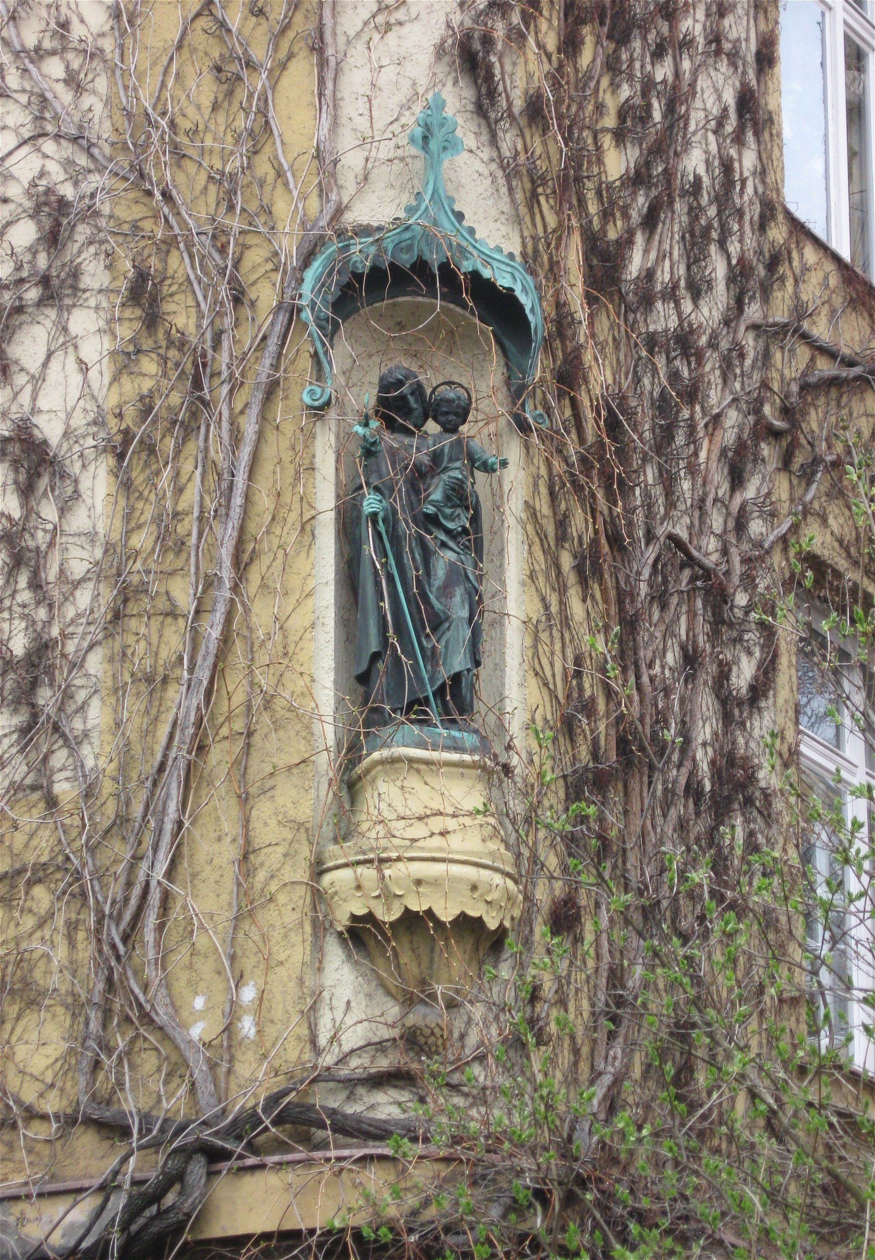 Adalbertstraße 98; Mietshaus, historisierend, mit Eckkuppel und Josephsfigur, 1898 von Martin Dülfer.